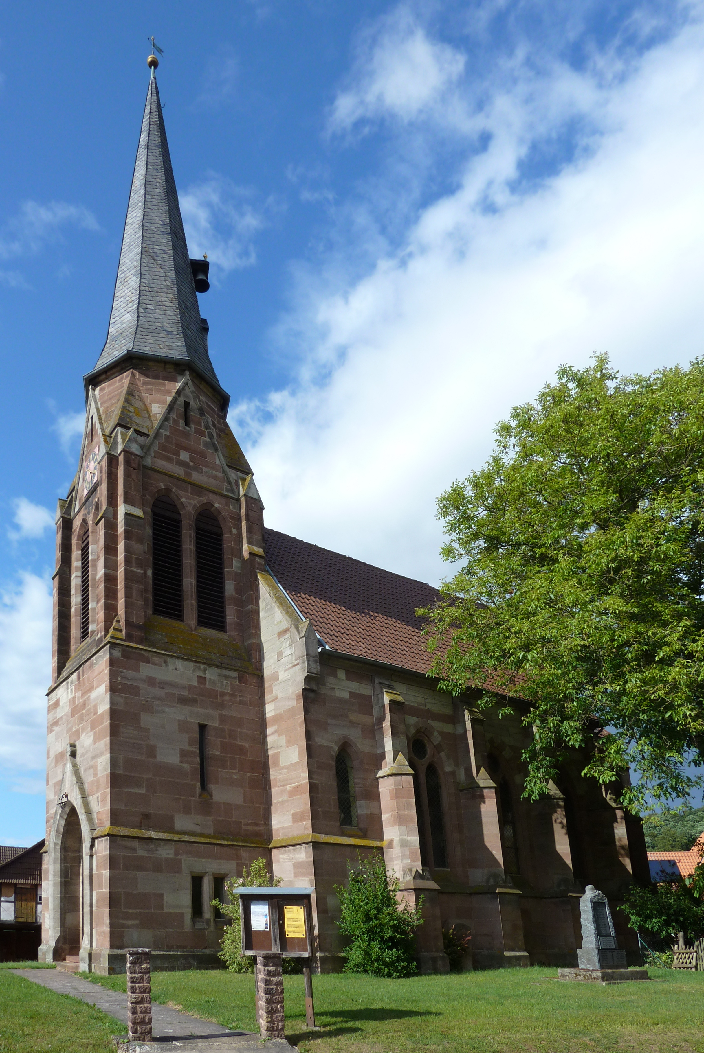 Evangelisch-reformierte Kirche in Etzenborn, Gemeinde Gleichen, Niedersachsen. Neugotische Saalkirche, erbaut Ende des 19. Jahrhunderts